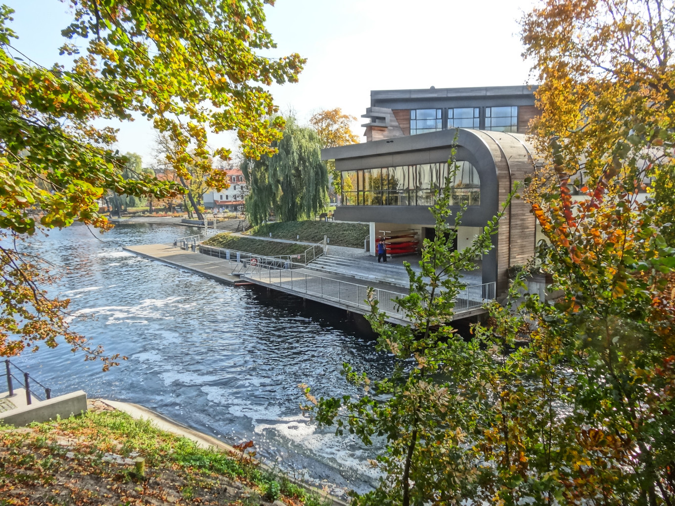 Przystań Bydgoszcz na Wyspie Młyńskiej